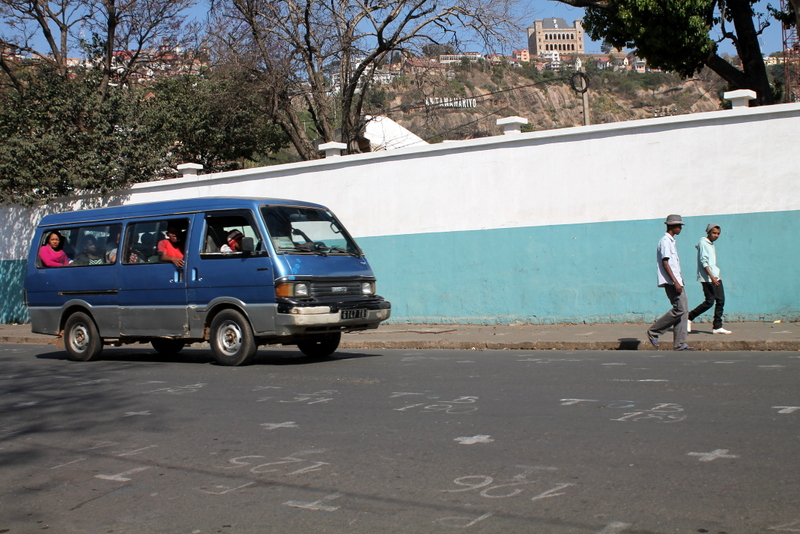 Antananarivo september 2015